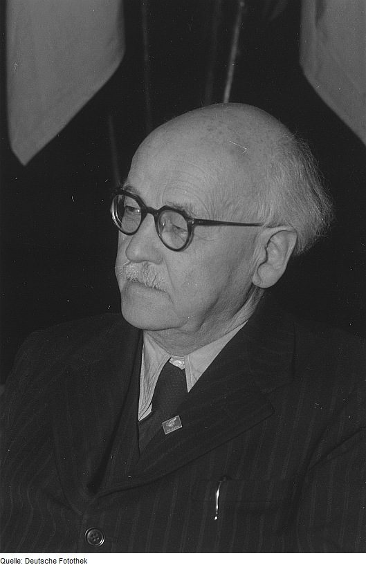 Original image description from the Deutsche Fotothek Porträt des Professors D. Emil Fuchs